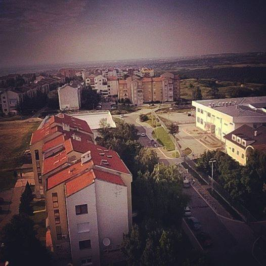 Naselje Gorica u Sremcici